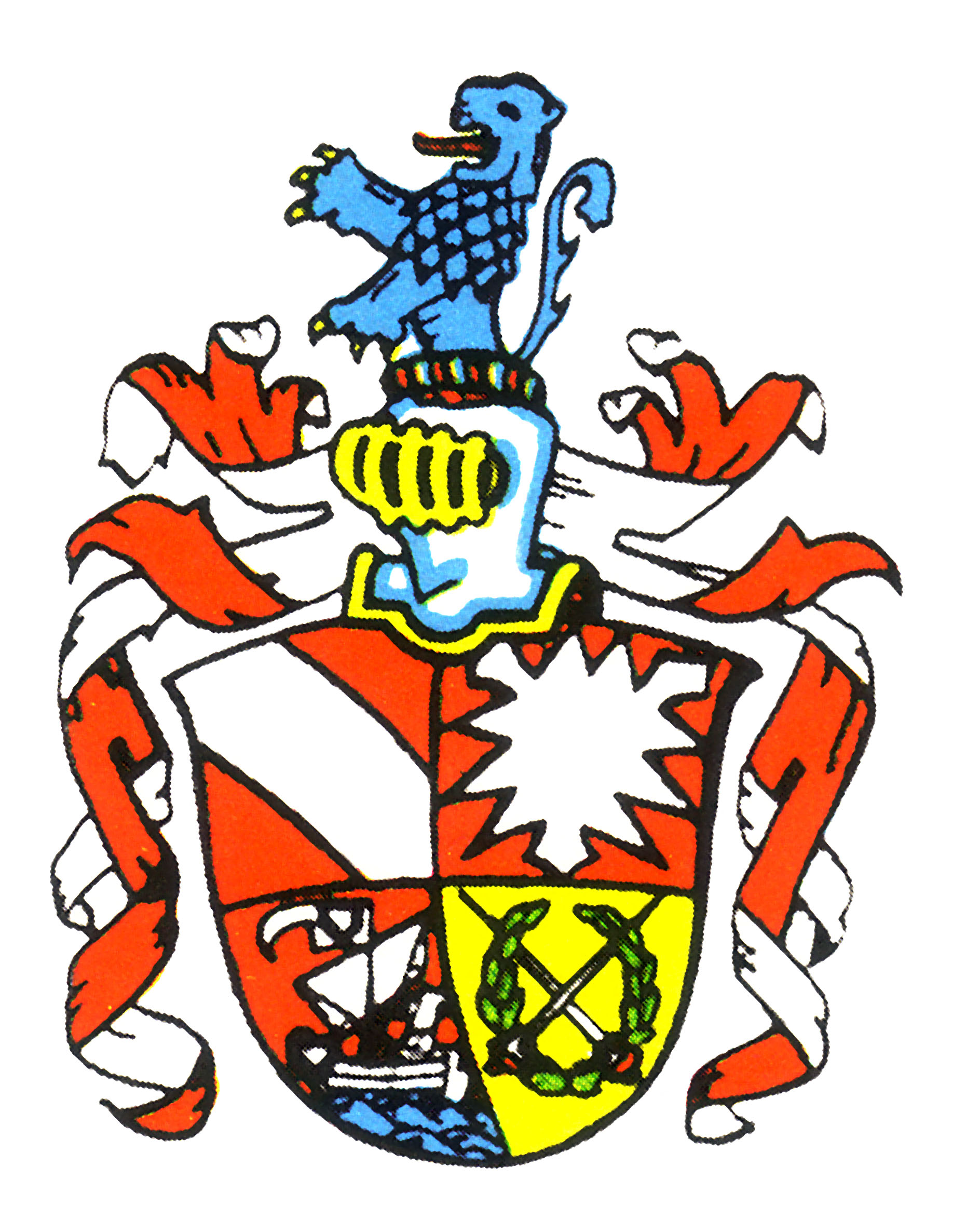 Studentenwappen des Corps Holsatia Kiel